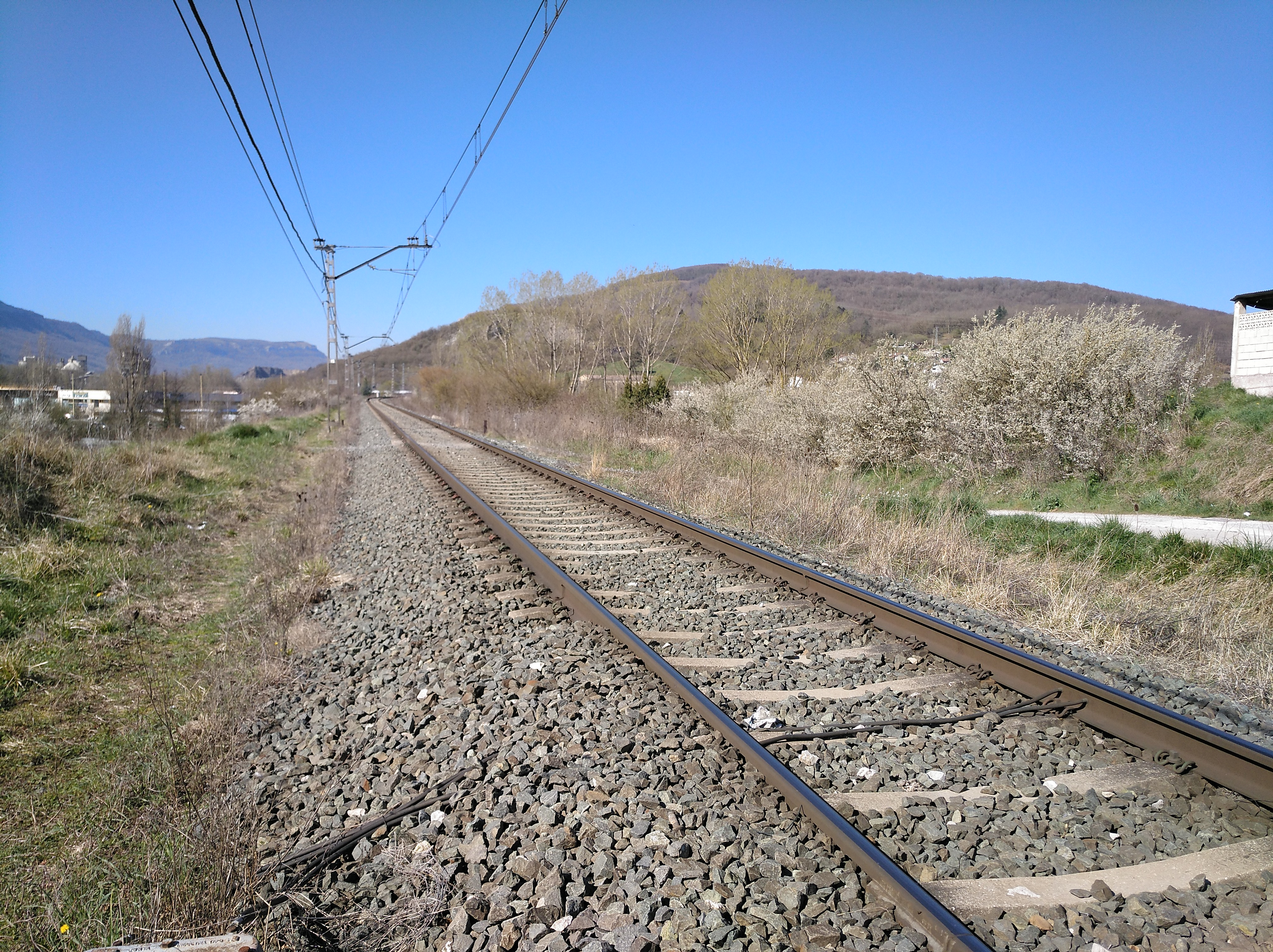 Altsasu-Iruñea burdinbide tartea Altsasun, Irun-Madril burdinbideko lotunea baino lehen